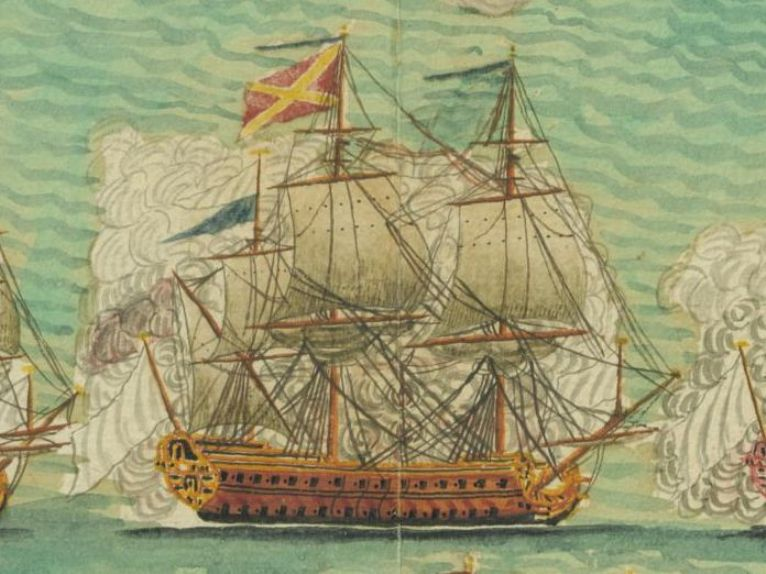 Vaisseau français de 74 canons le Redoutable à la bataille de Minorque en 1756. Guerre de Sept Ans. Aquarelle. Détail.